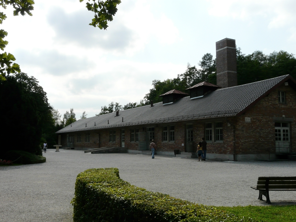 Konzentrationslager Dachau: In der sogenannten Baracke X waren die Gaskammer und das zweite Kreamatorium mit seinen vier Verbrennungsöfen untergebracht.